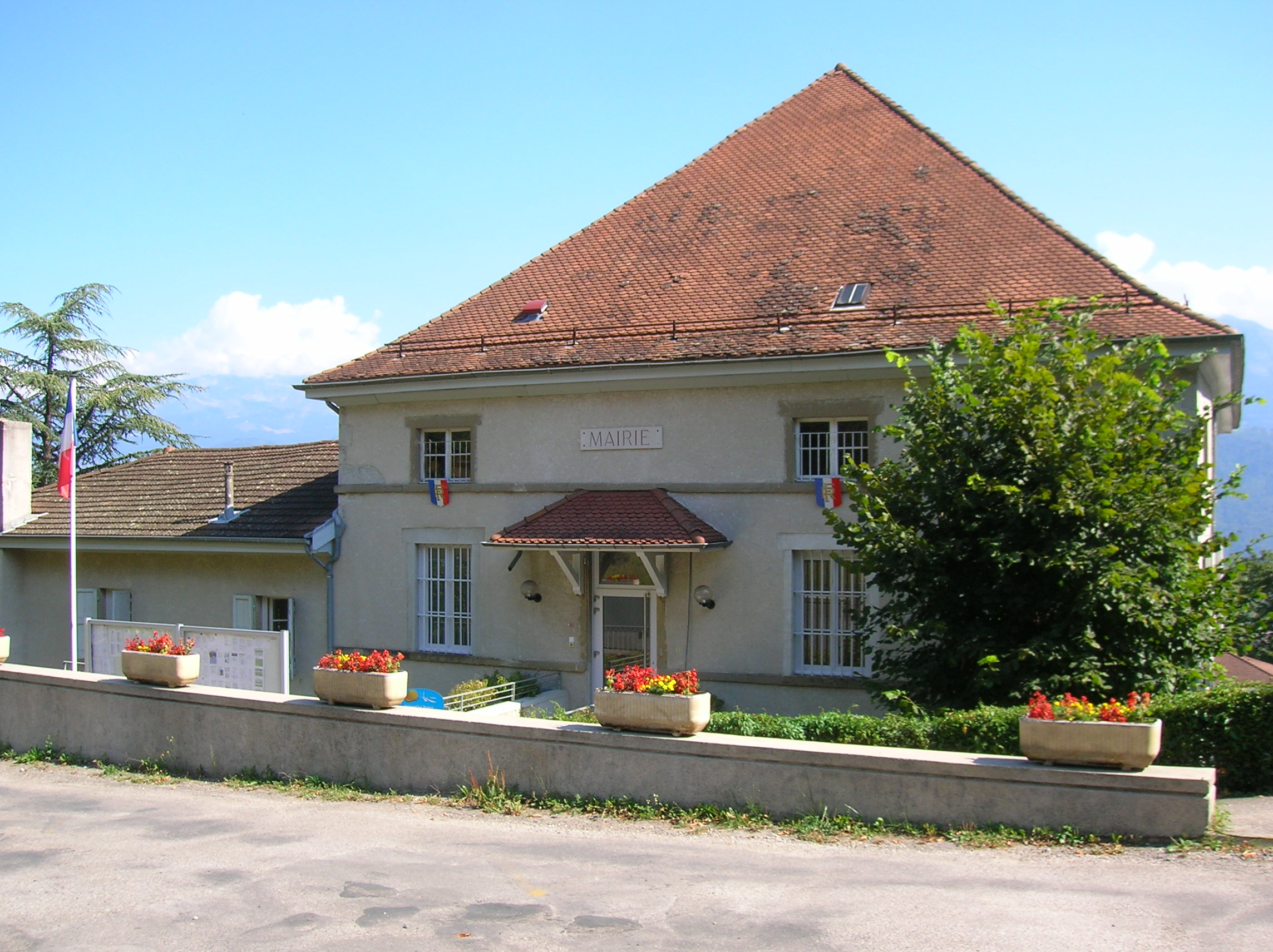 mairie. Biviers, Isère, AuRA, France.